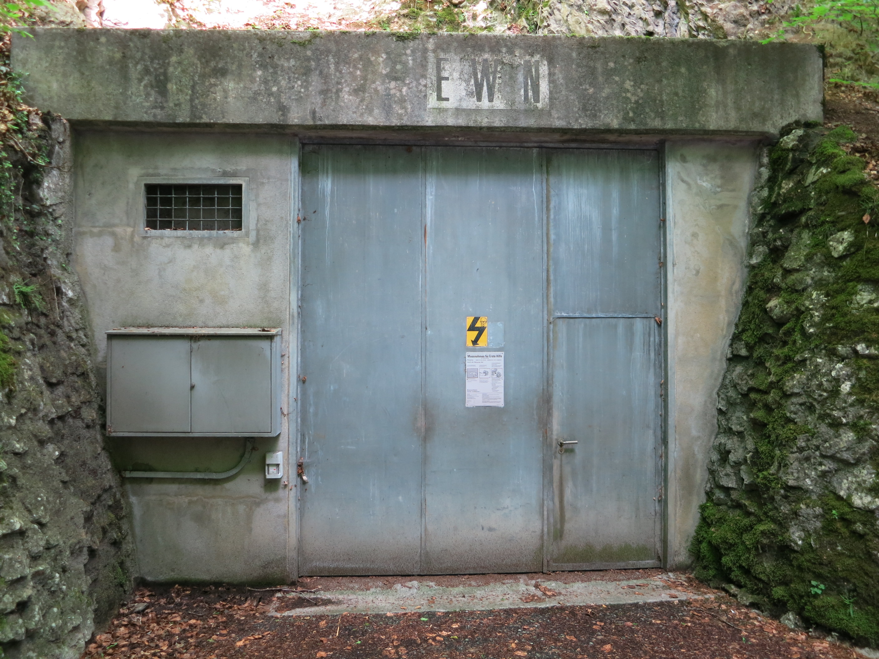 Artilleriewerk Kilchlidossen, Stansstaad NW, Schweiz